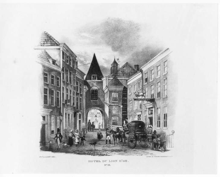 Het pand van het Hotel du Lion d'Or rechts in de Hofstraat; in het m. de Hofpoort (of Zuidpoort) naar het Binnenhof, rechtsachter de poort een van de torens van de Ridderzaal